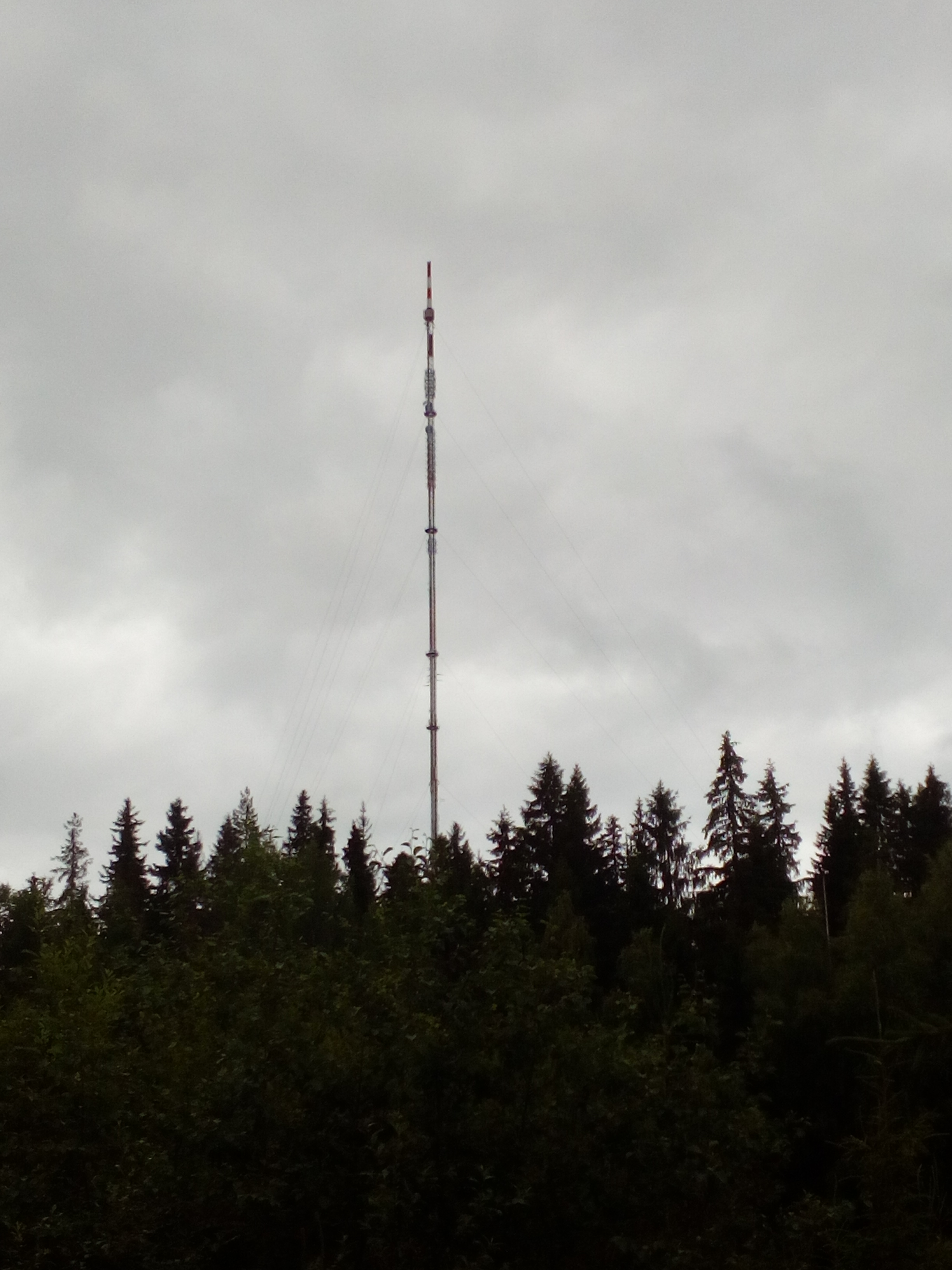 Teiskon radio- ja televisioasema